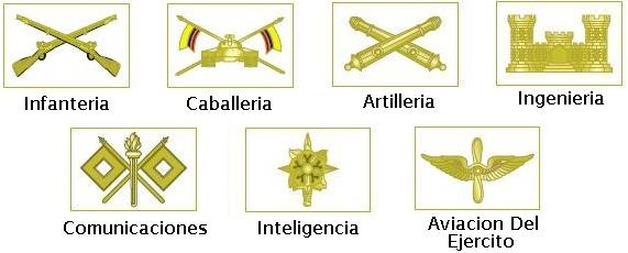 Las insignias de las Armas del Ejecito del Ecuador